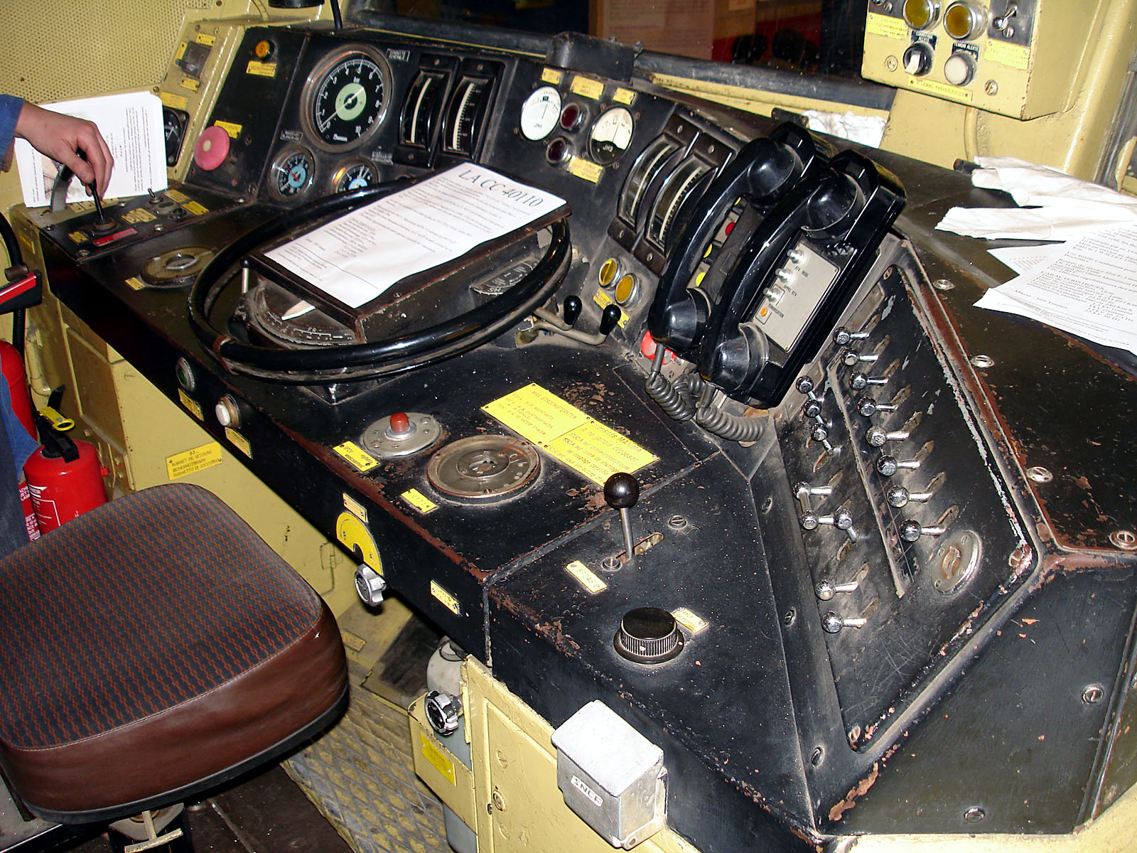 Poste de conduite de la CC 40110 au technicentre Paris Nord-Joncherolles, Villetaneuse, Seine-Saint-Denis, France.